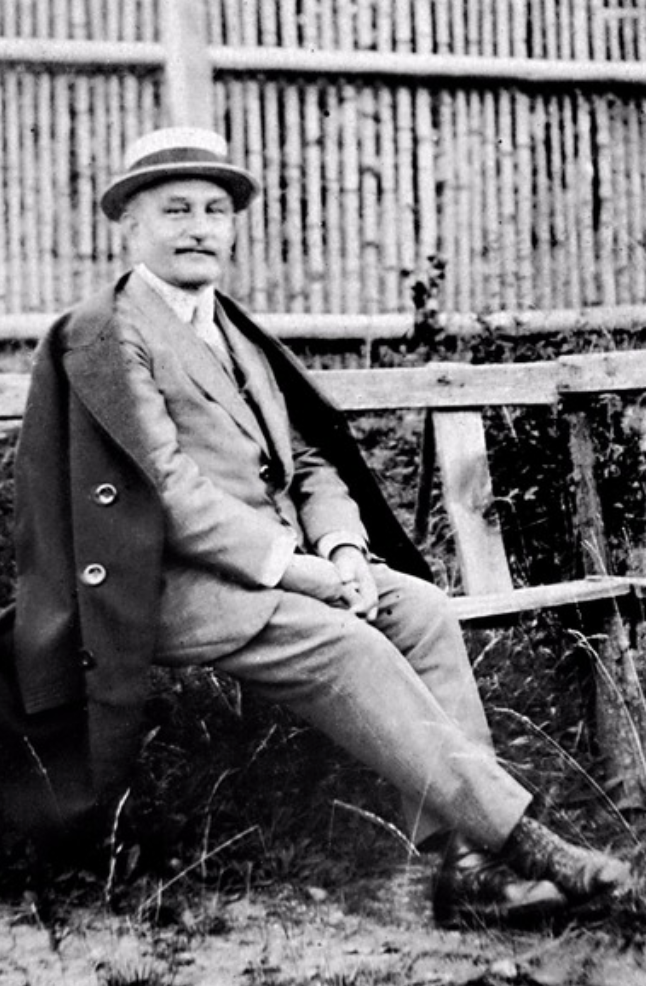 Leóš Janáček a Luhačovice (1917)